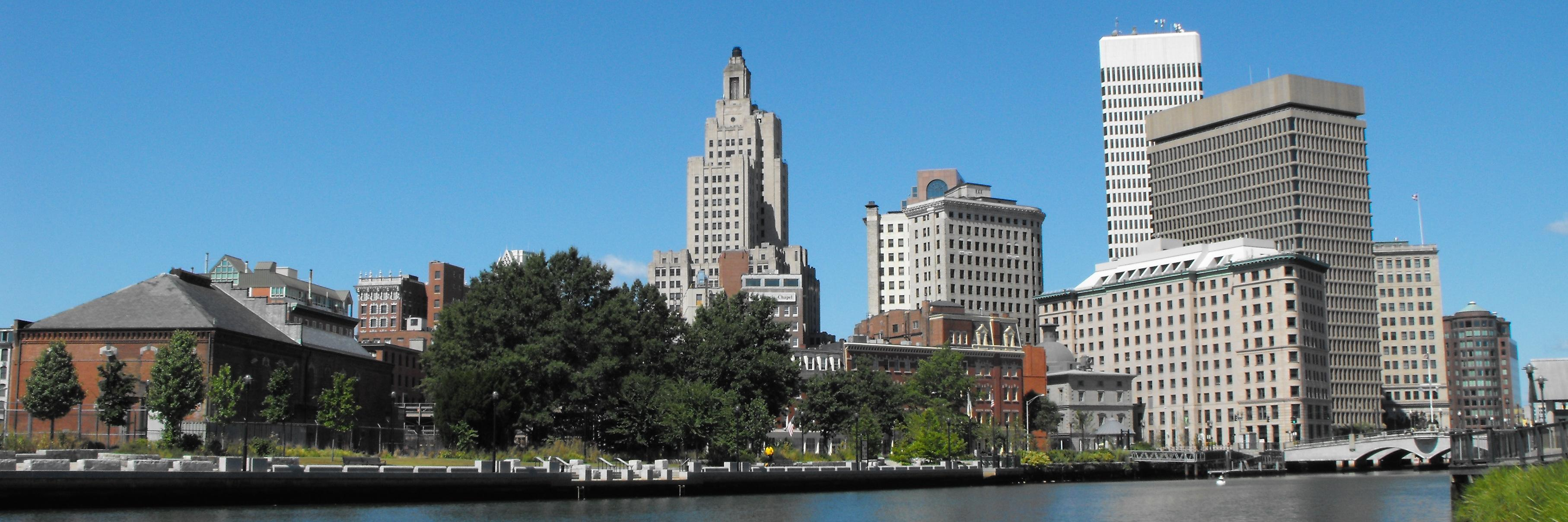 Providence, Rhode Island